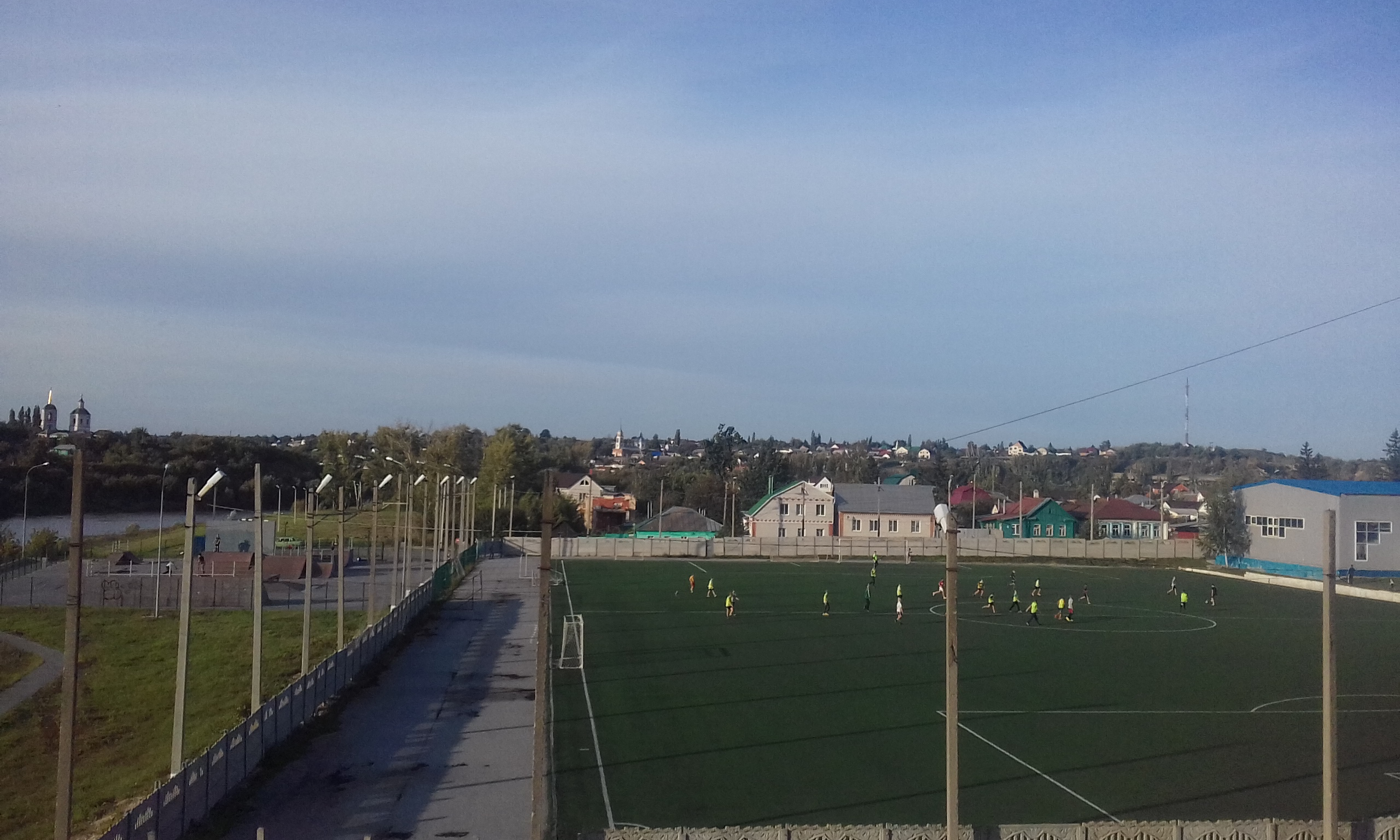 Елец. Футбольное поле спорткомплекса, находящегося рядом с Каракумовским мостом.